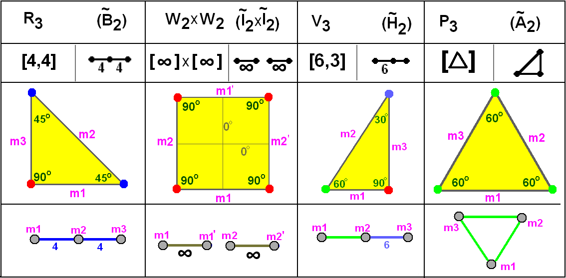 Sen teksto por uzo en cxiuj lingvoj / без текстов для использования во всех языках